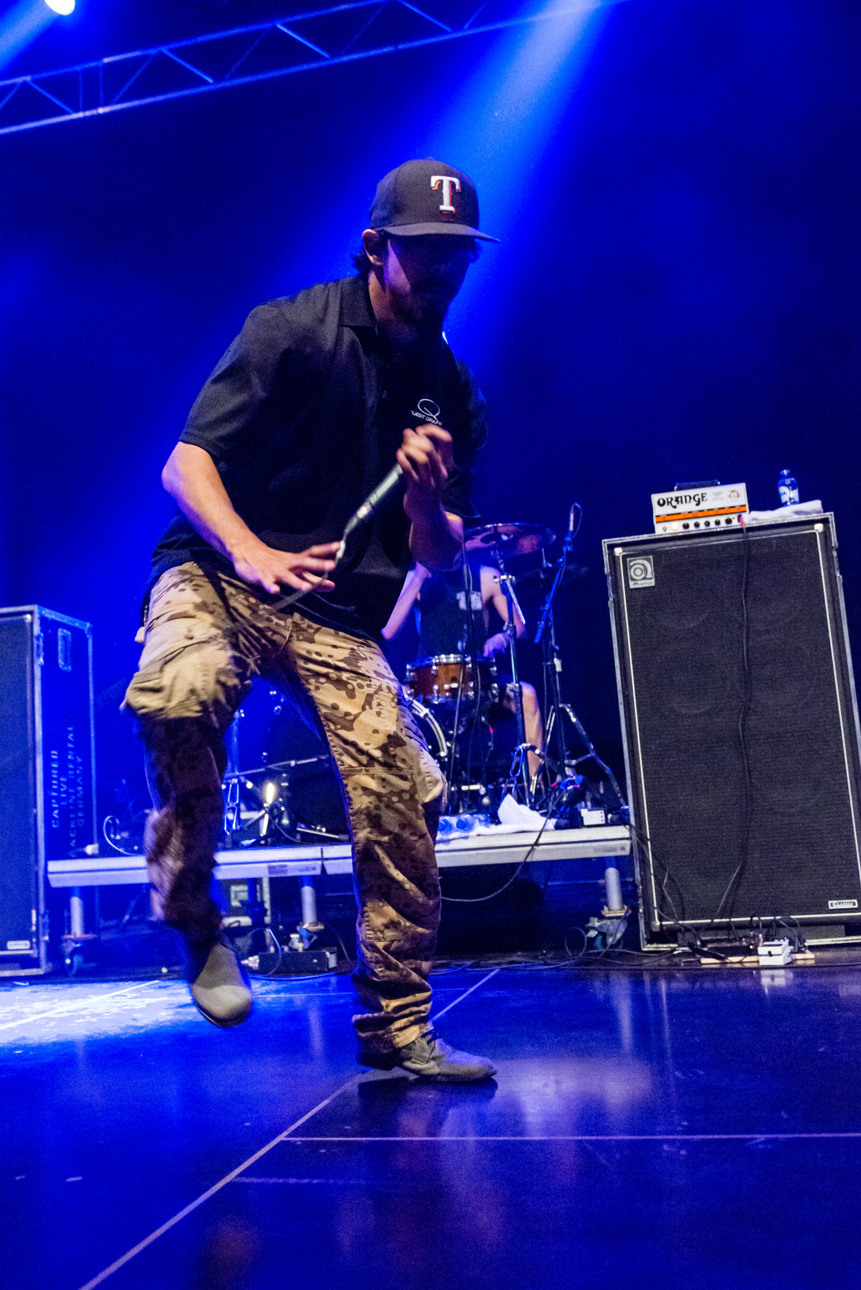 'Impericon Festival 2015; Oberhausen Turbinenhalle': 'Kublai Khan'